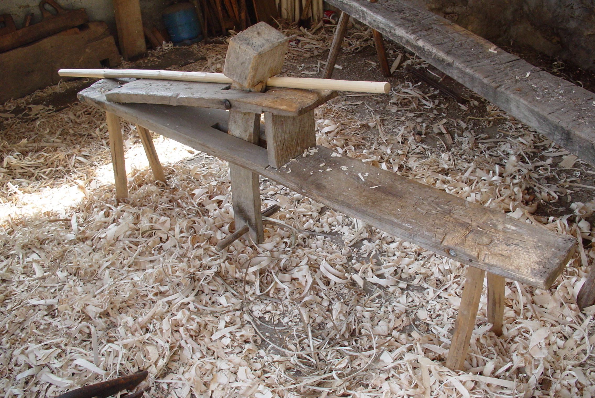 Banc d'âne utilisé pour maintien des manches de grands outils (pelles, fourches...) ou petits piquets. La pièce de bois est bloquée par la tête actionnée par les pieds. Pendant ce temps le travail du bois est opéré à la plane. Ce dispositif est utilisé par certains artisans en Cantabrie (Espagne).